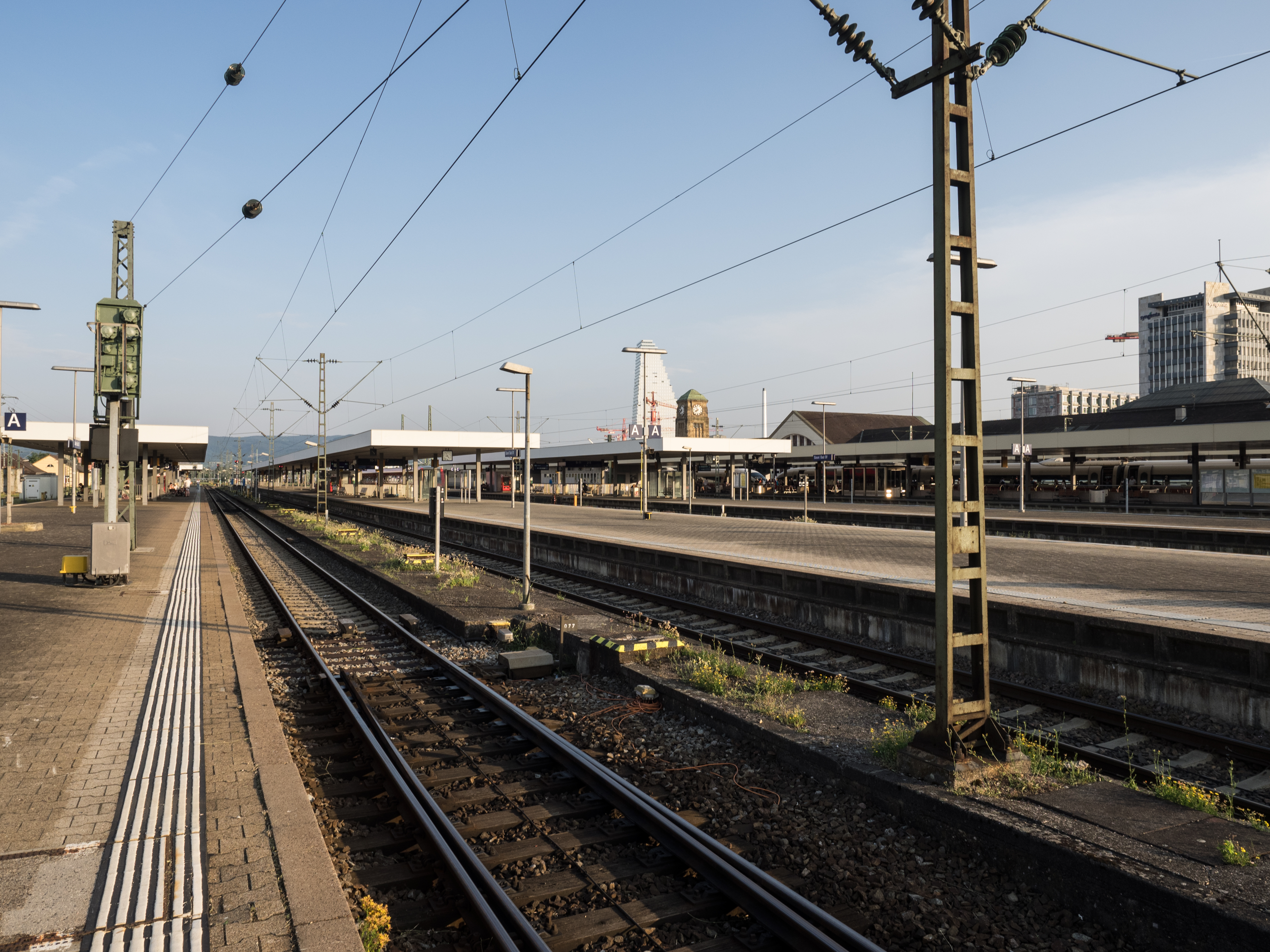 Die Perrons des Badischen Bahnhofs Basel, Situation 2015